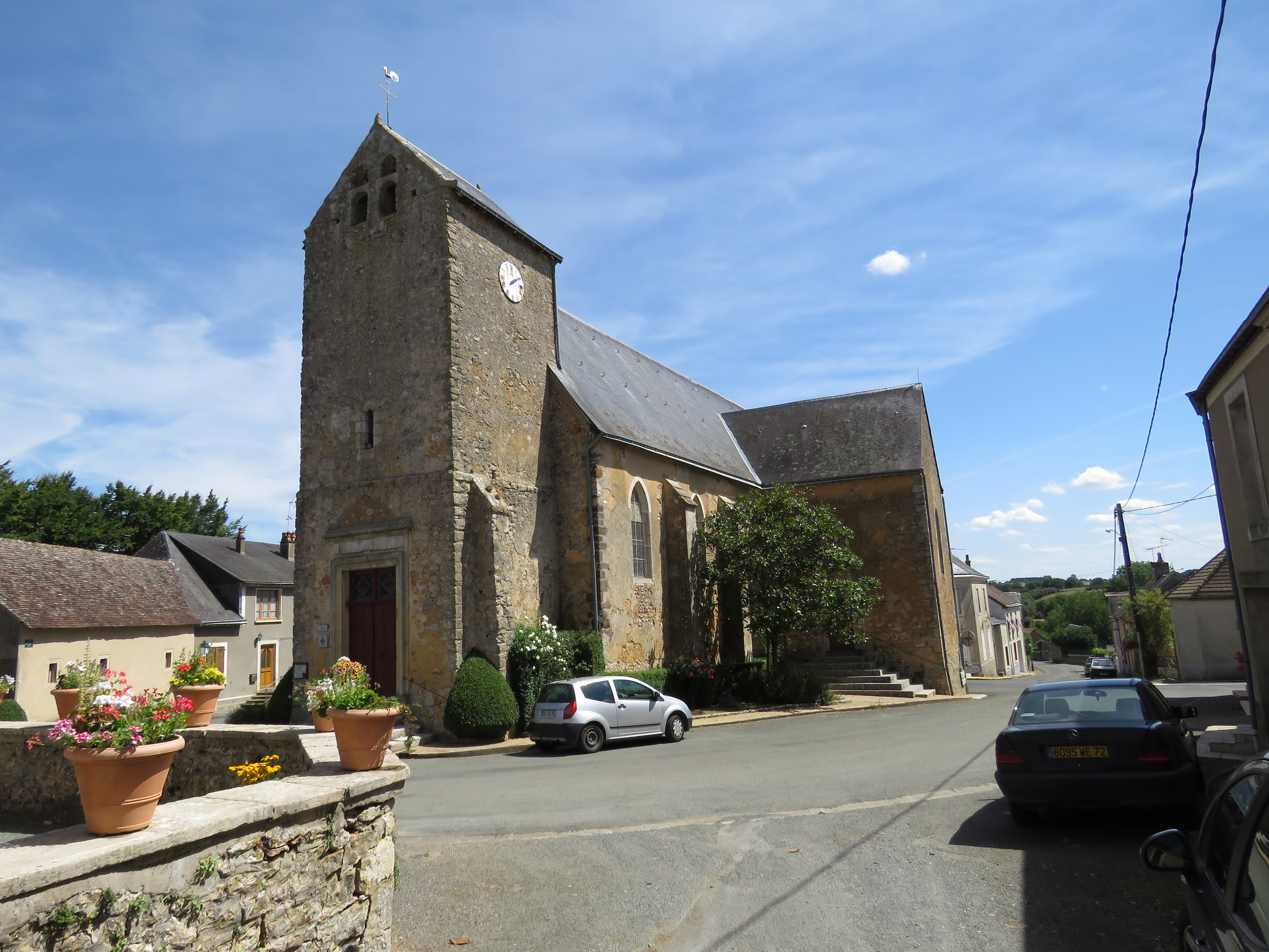 Façade ouest